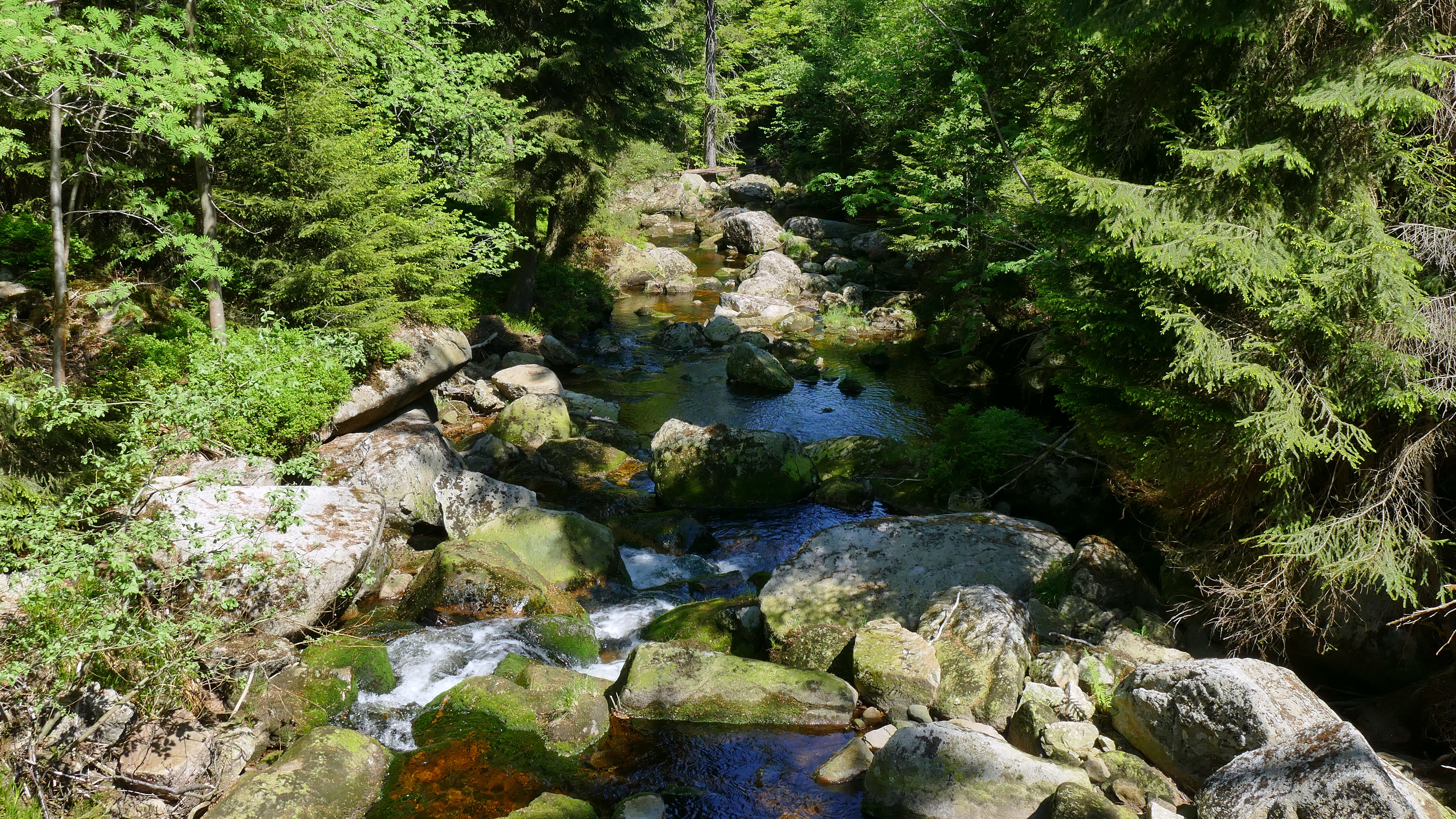 Kurz vor Einmündung der Ecker in den Eckerstausee unterhalten die Harzwasserwerke den Pegel Gitterkopf. Die Ecker fließt hier durch den niedersächsischen Teil des Nationalparks Harz, ebenso durch das FFH-Gebiet Nationalpark Harz (Niedersachsen) (4229-302). Hier sieht man die Ecker direkt unterhalb des Pegels.